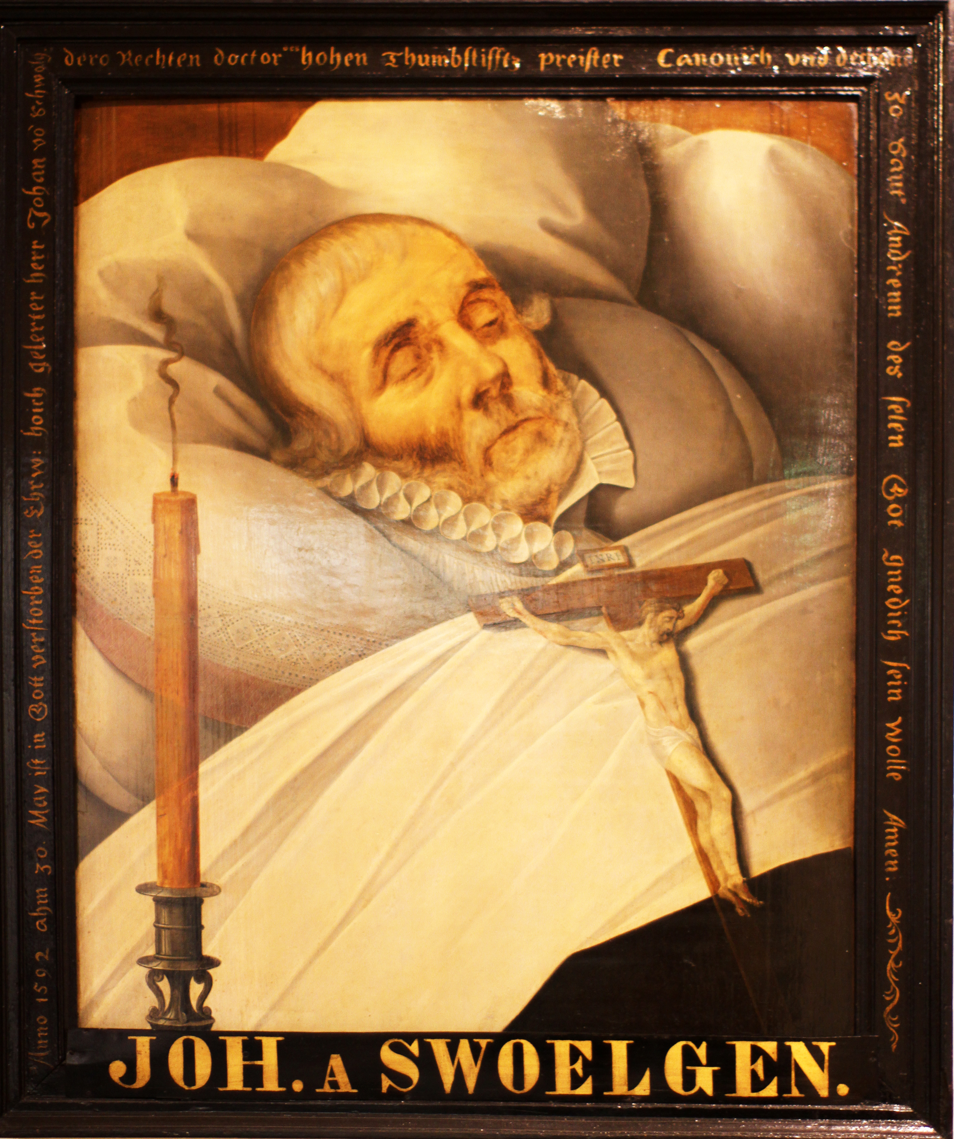 Johann von Swolgen, auch Johannes Swoelgen (* 1521 in Zwolgen/Provinz Limburg (Niederlande); † 30. Mai 1592 in Köln war ein bedeutender Kleriker des 16. Jahrhunderts. Öl auf Holz, 69,5 X 54 cm